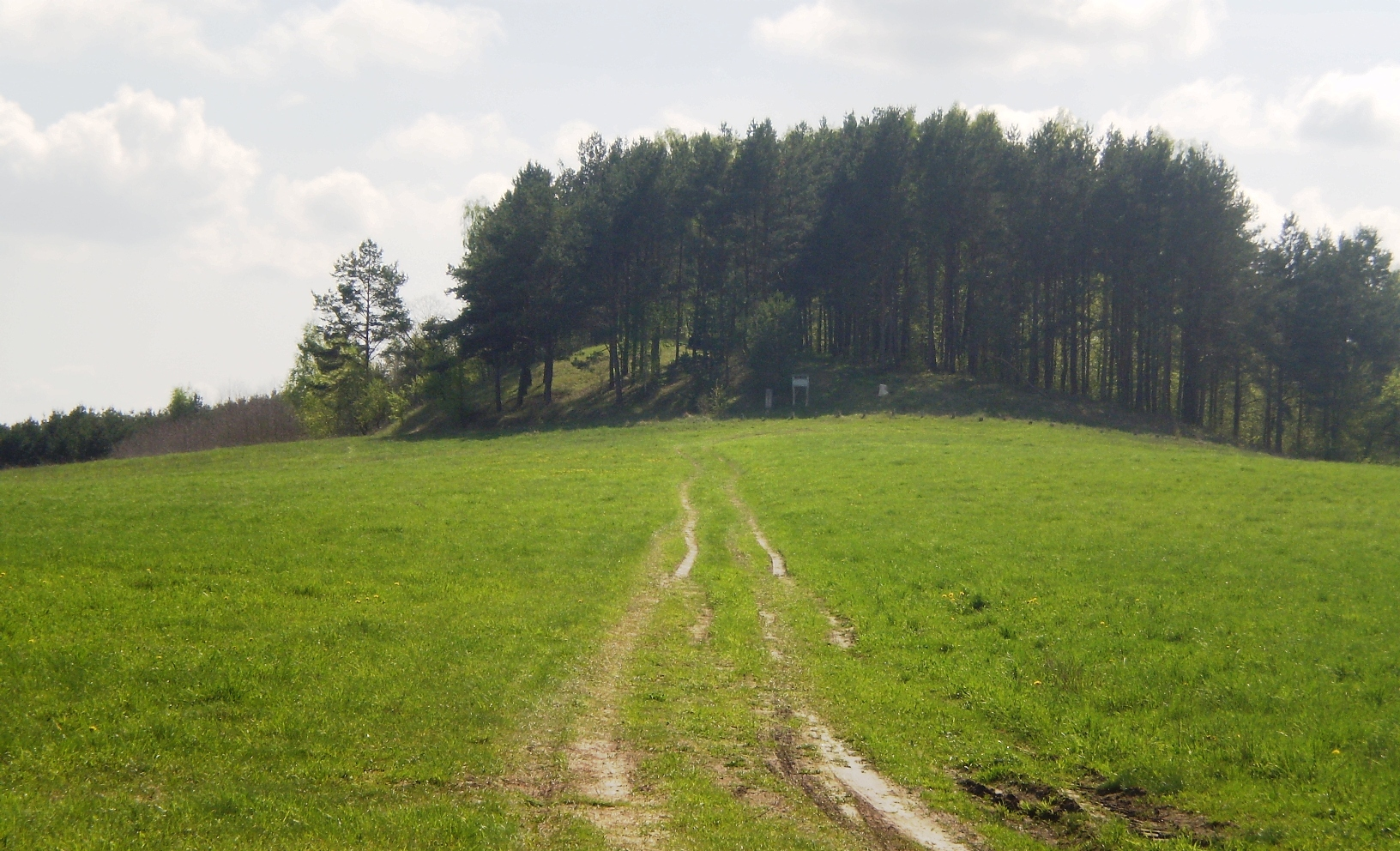 Burvelių alkakalnis, Panevėžio raj.